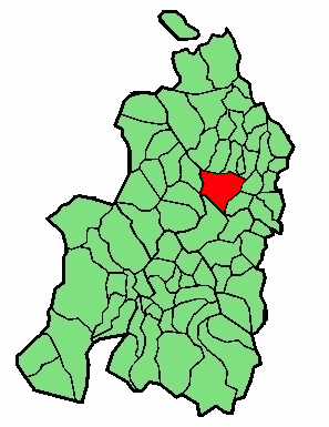 aipaturiko udalerriaren kokapena Nafarroa Beherean